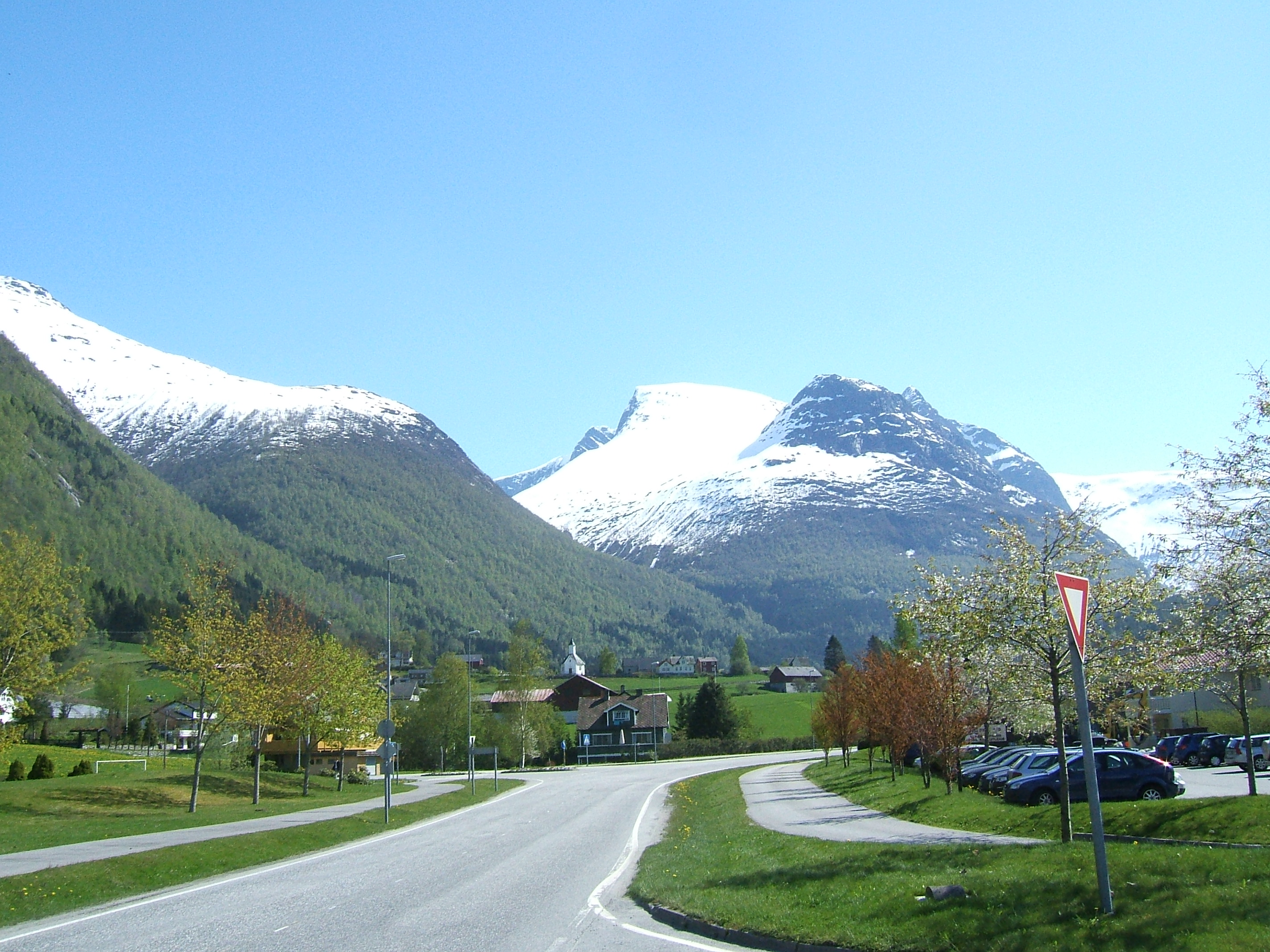 Loen